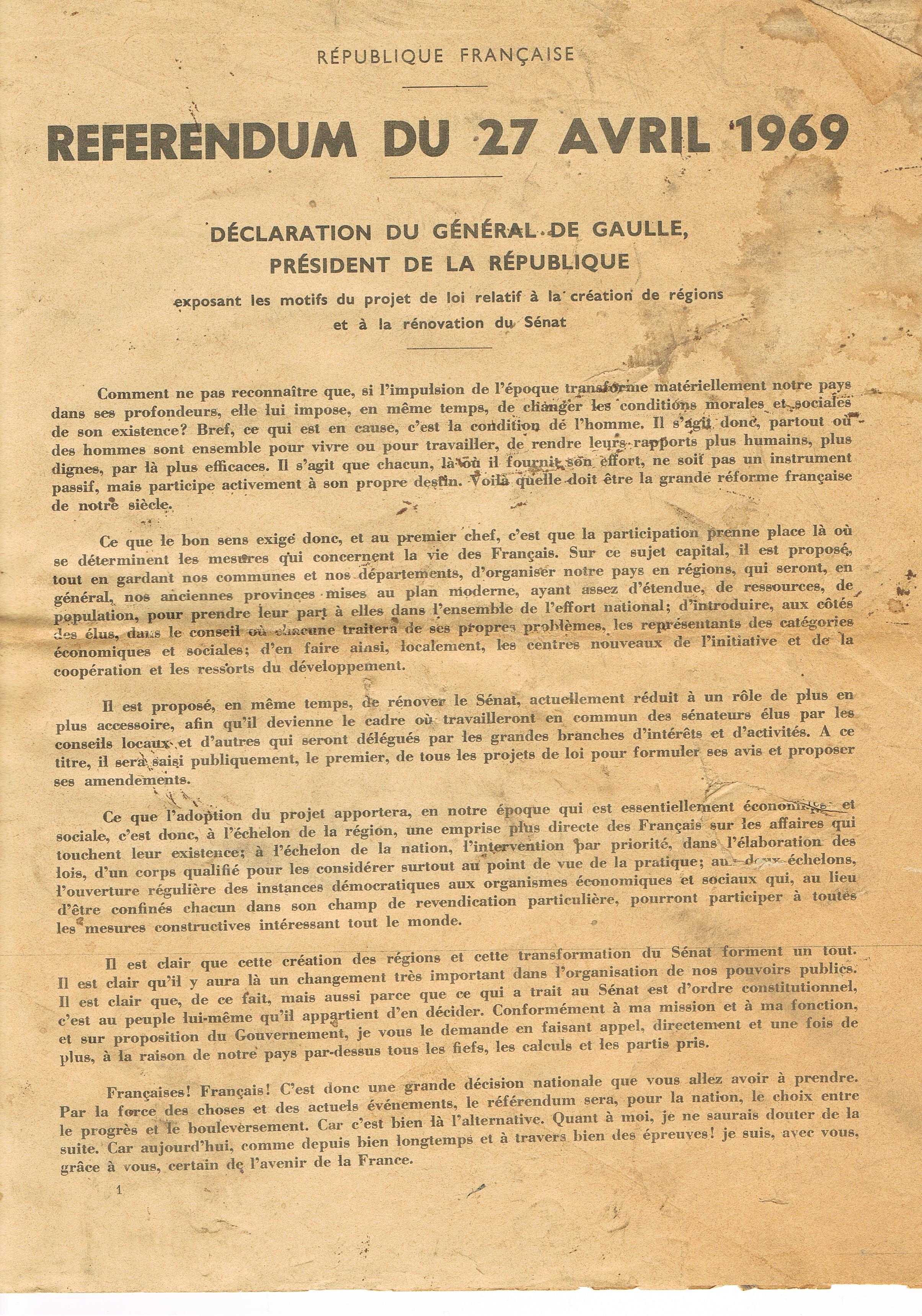 Document descriptif de la réforme sur le Sénat et la régionalisation, soumis au peuple français par référendum le 27 avril 1969.